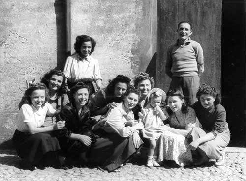 Fotogramma del documentario "Viaggio nell'Italia che cambia". Maria Bigarelli e le sue prime operaie.